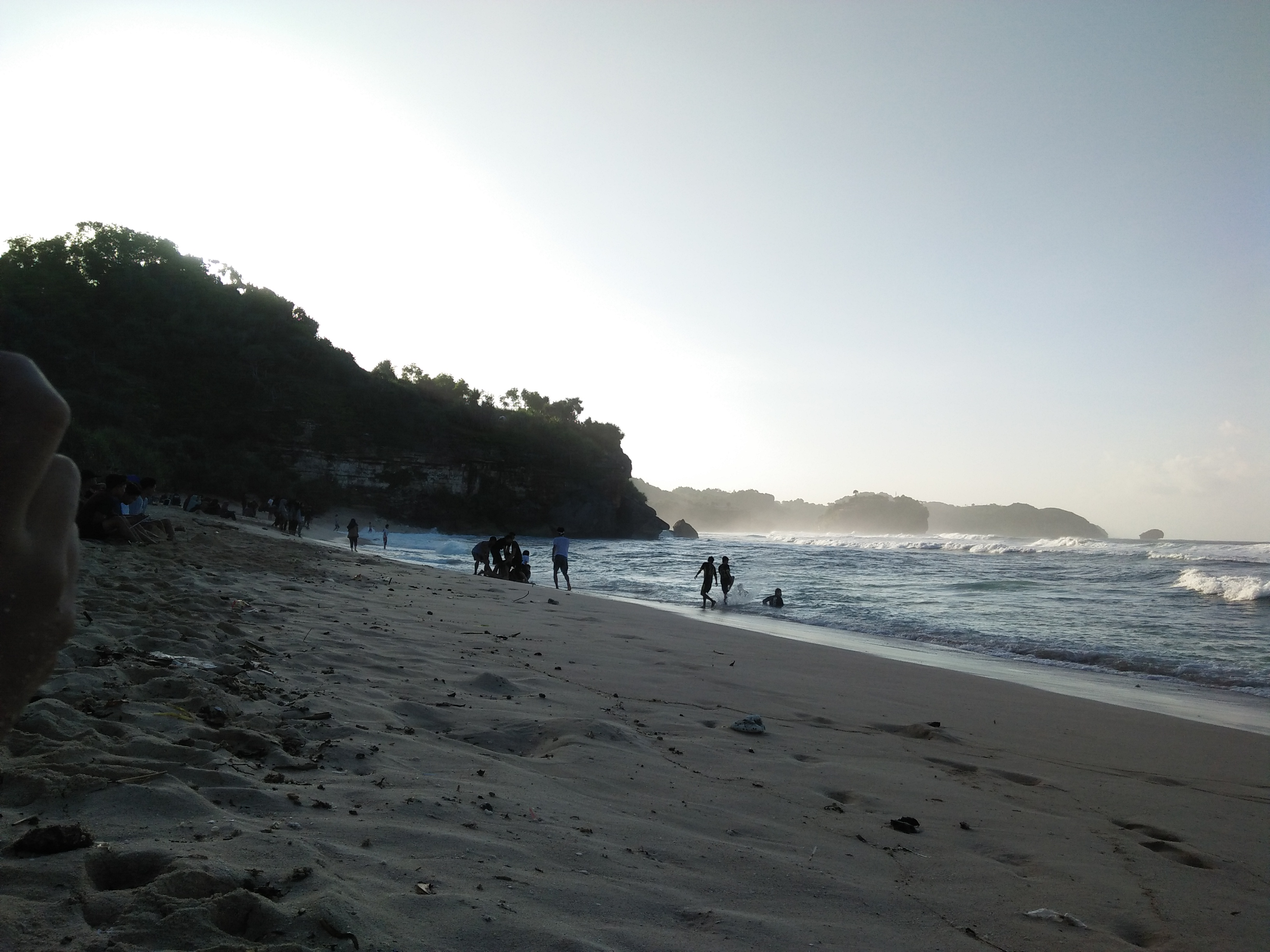 Jawa: Gisik Sanglen inggih punika gisik ingkang biasanipun dipunginakaken kagem kemah.